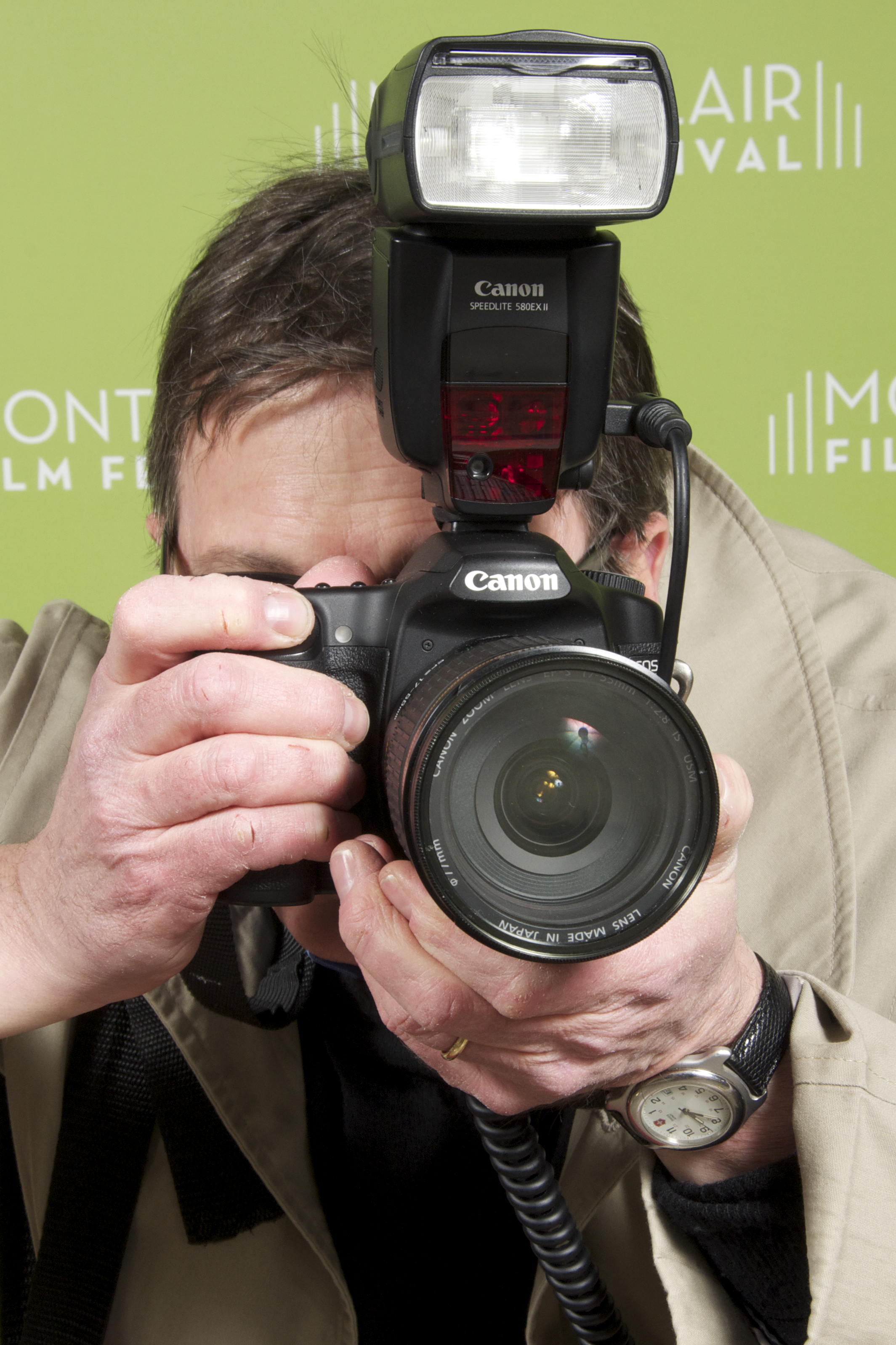 MFFArrivals_DD- 174